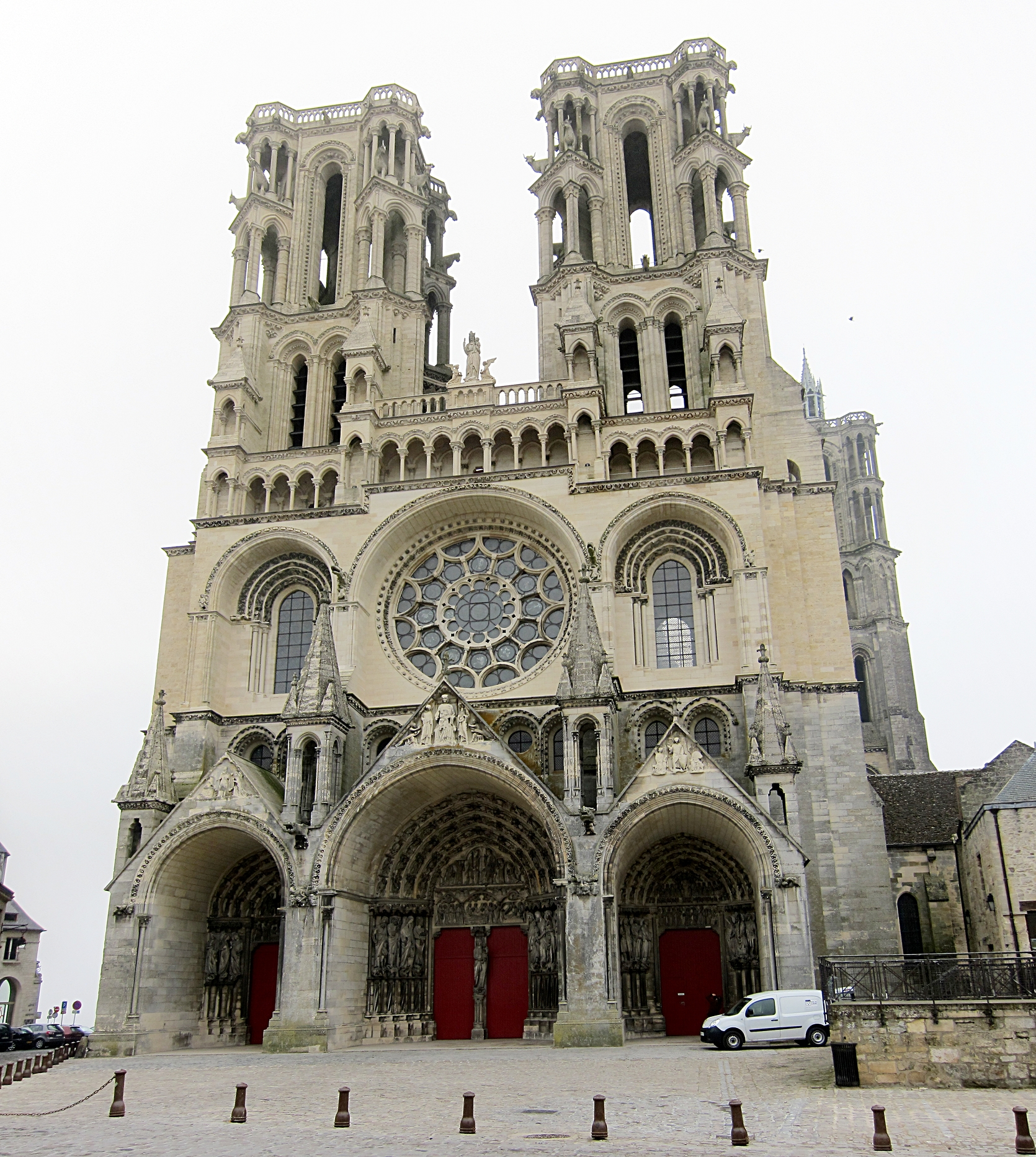 La façade de la cathédrale Notre-Dame de Laon (Aisne).